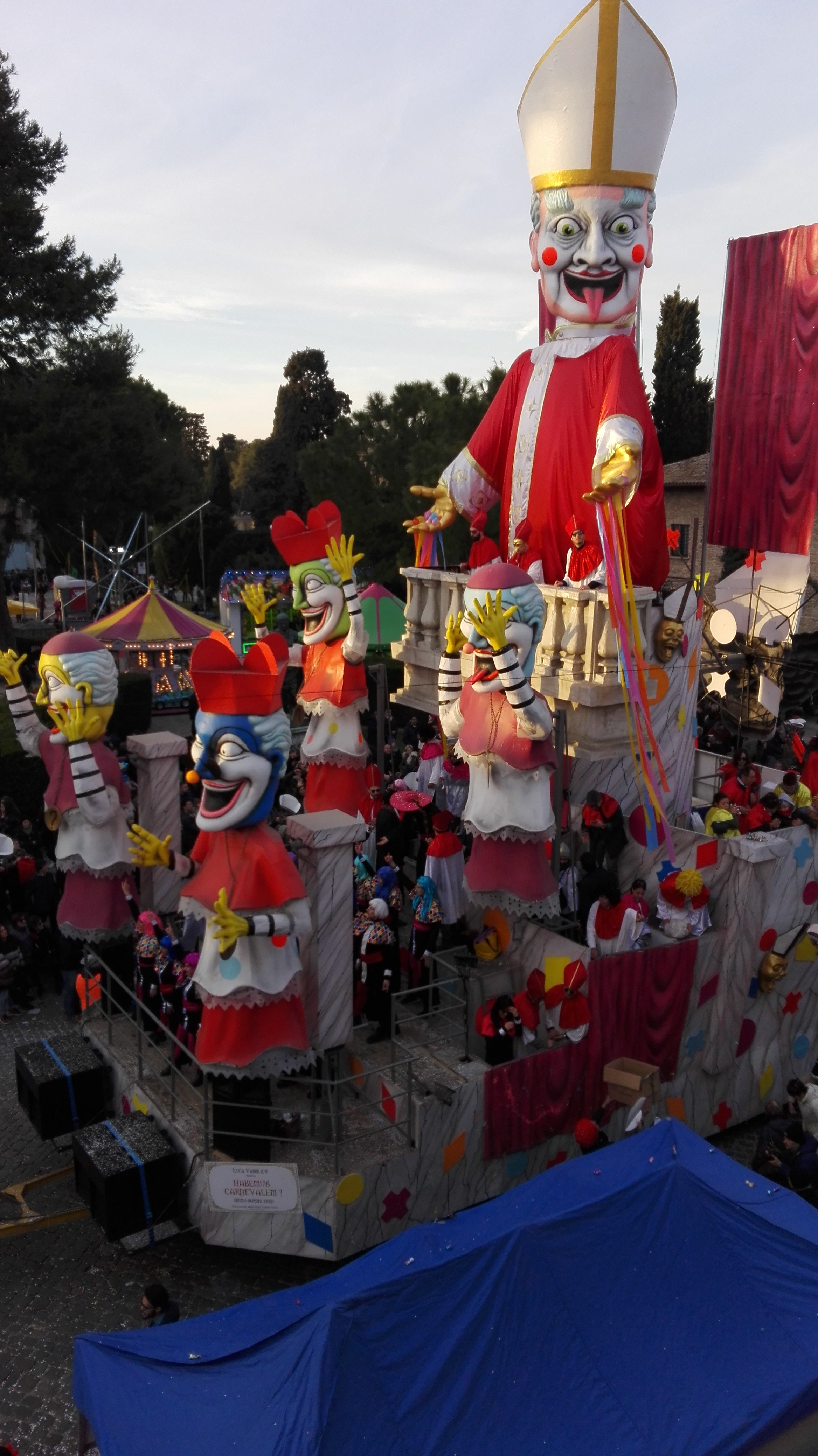 Carnevale di Fano 2016